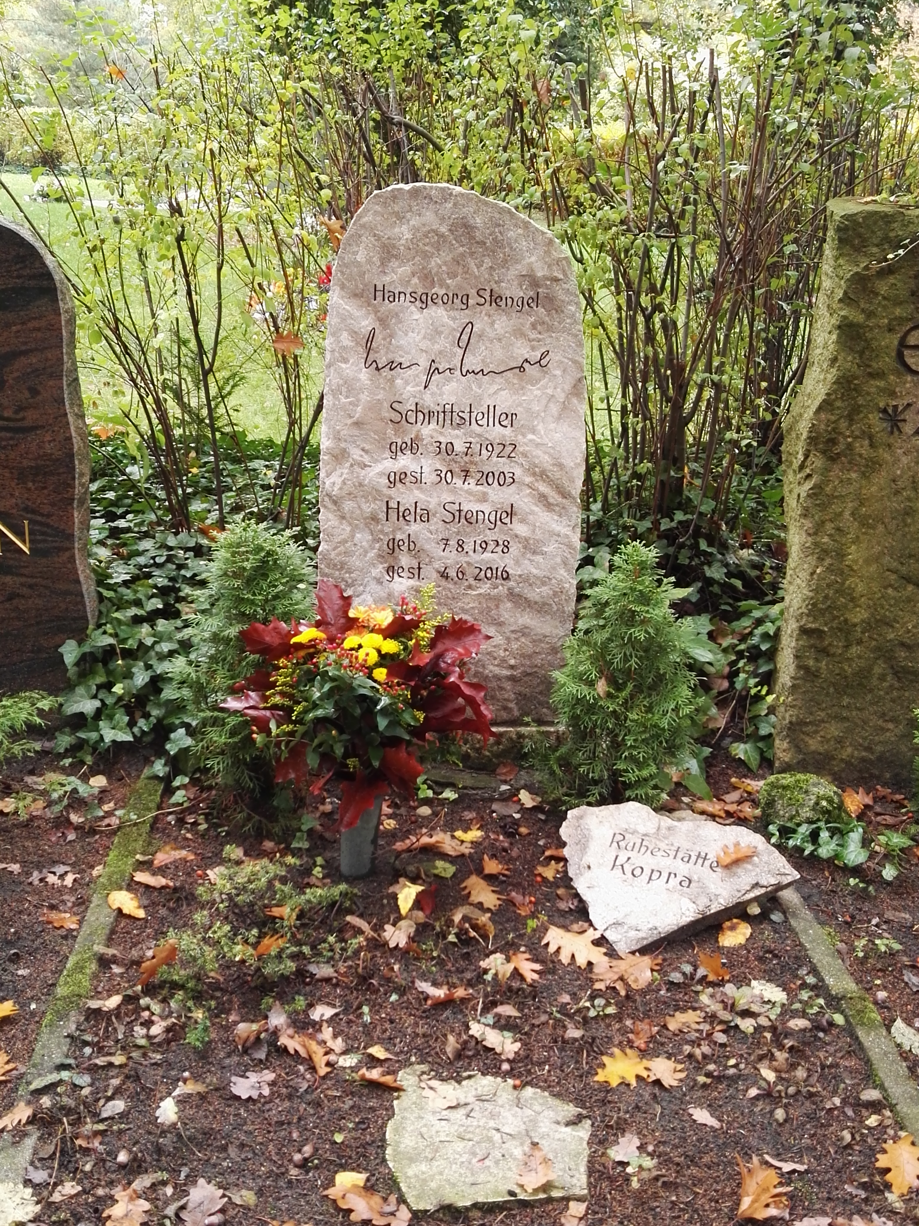 Grab von Hansgeorg Stengel auf dem Zentralfriedhof Friedrichsfelde